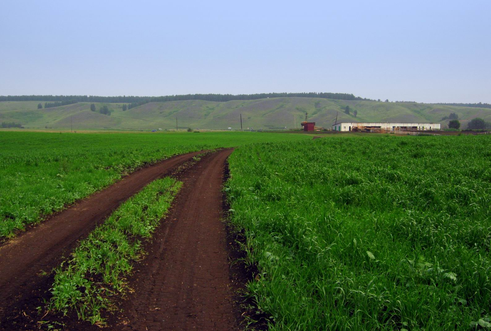 дорога к озеру